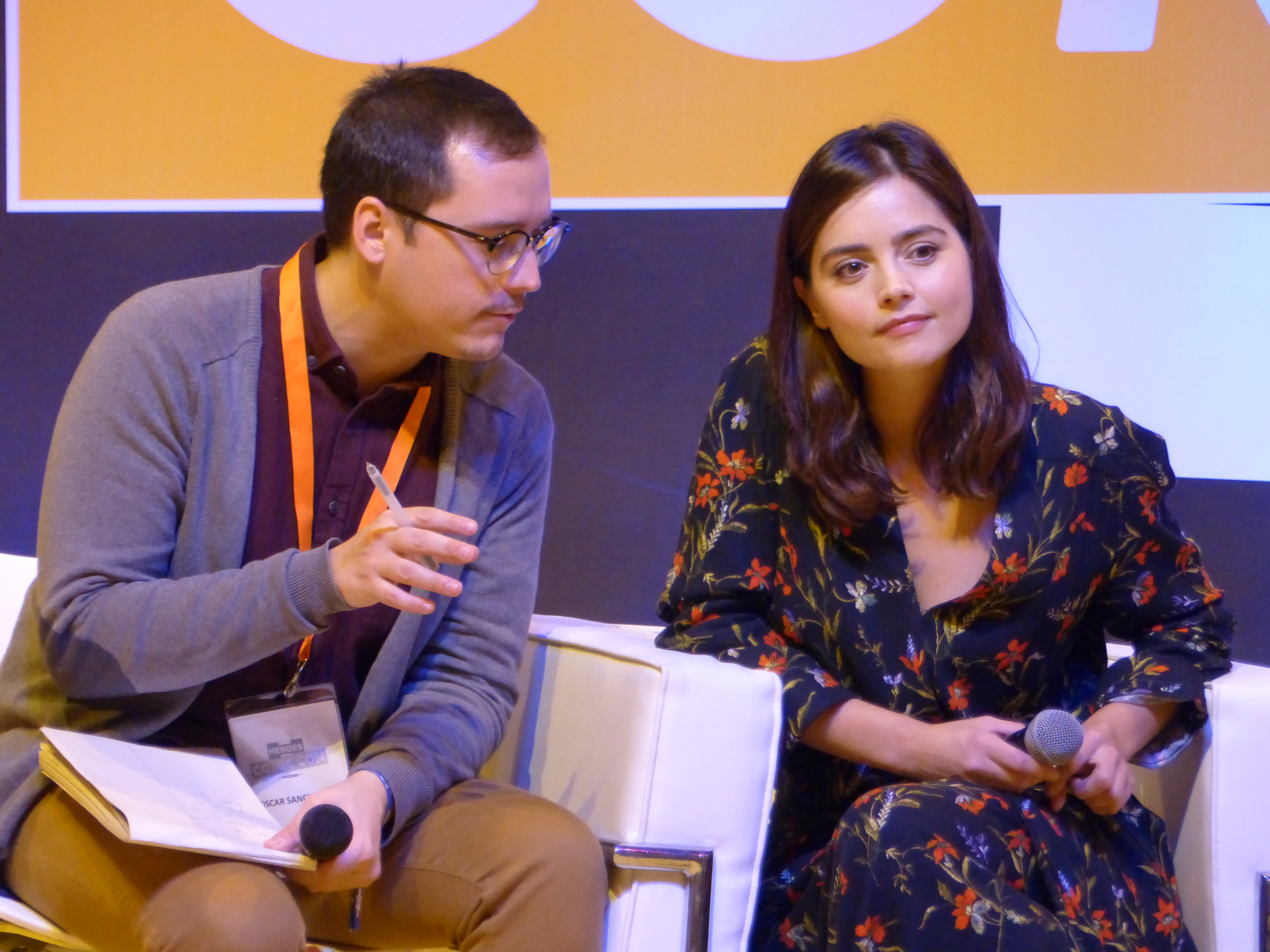 Jenna-Louise Coleman en la Comicon de Madrid, año 2017.